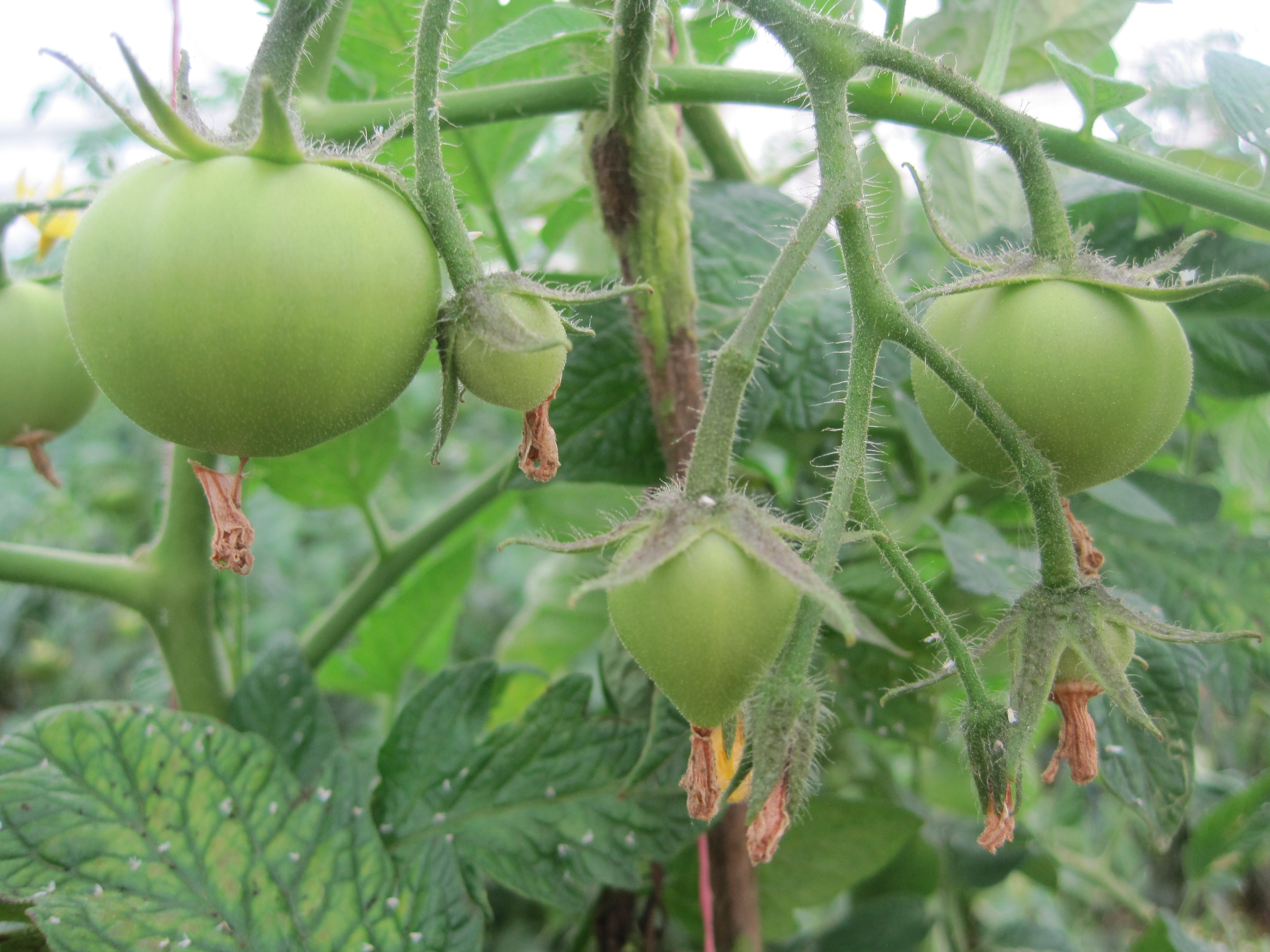 Frutos verdes de Solanum lycopersicum